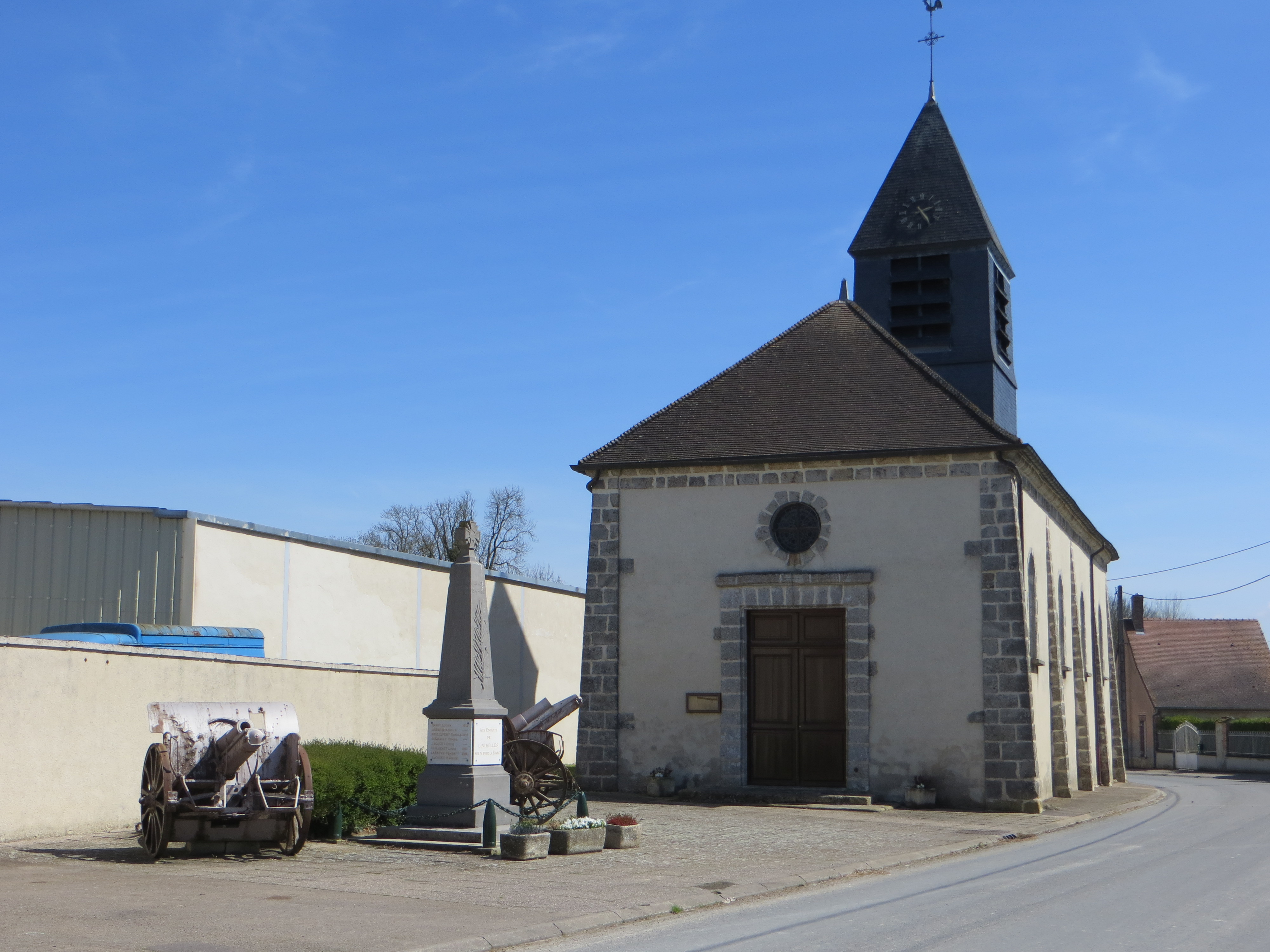 Monument aux morts de la commune, flanqué de deux canons, devant l'église Saint-Memmie